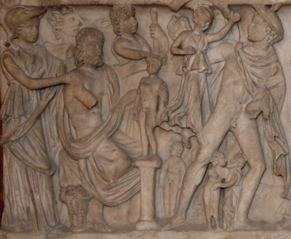 Particolare di questo file caricato su commons: File:Sarcophagus Prometheus Louvre Ma339.jpg